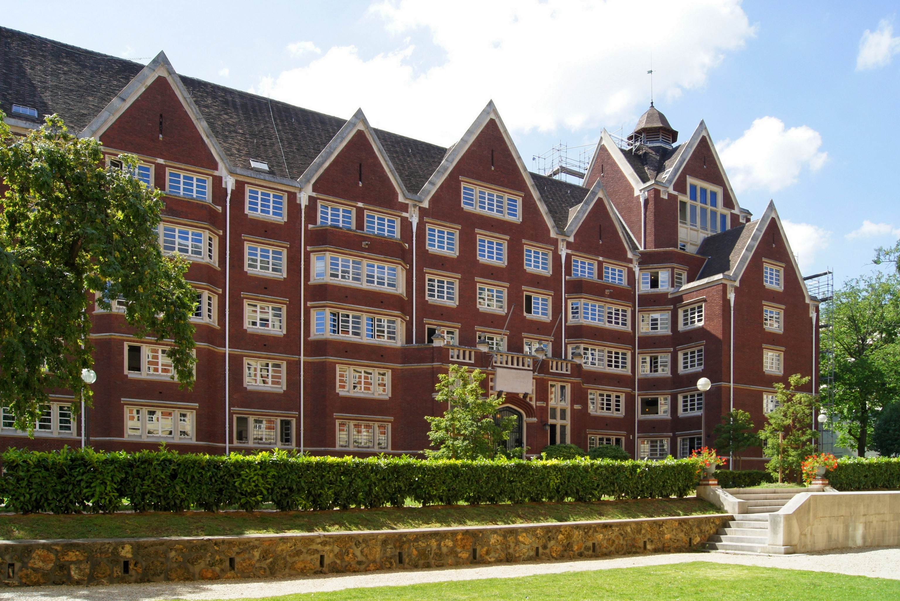 College Franco Britannique.